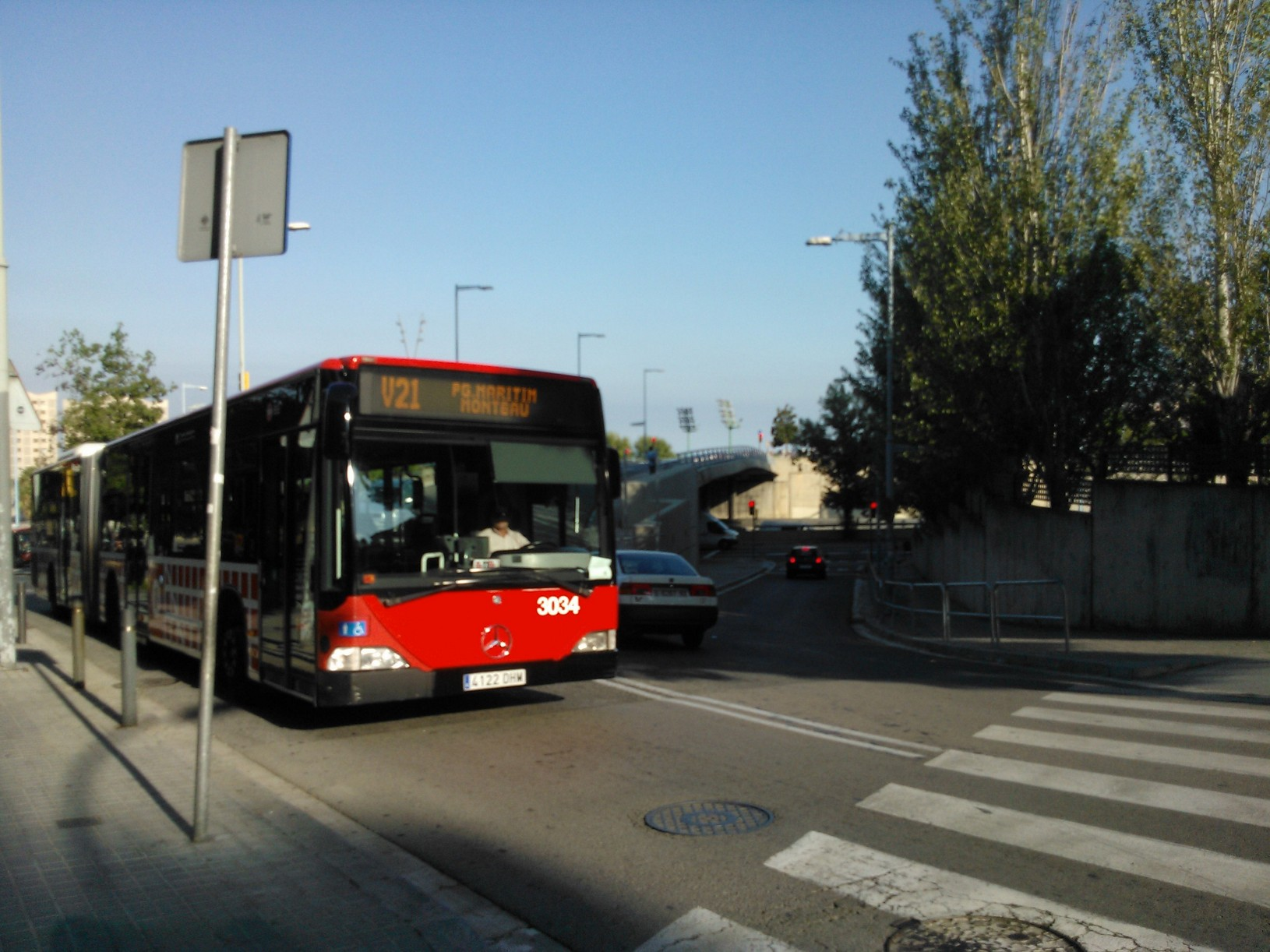 Autobús de la línia V21 a l'Hospital de la Vall d'Hebron.